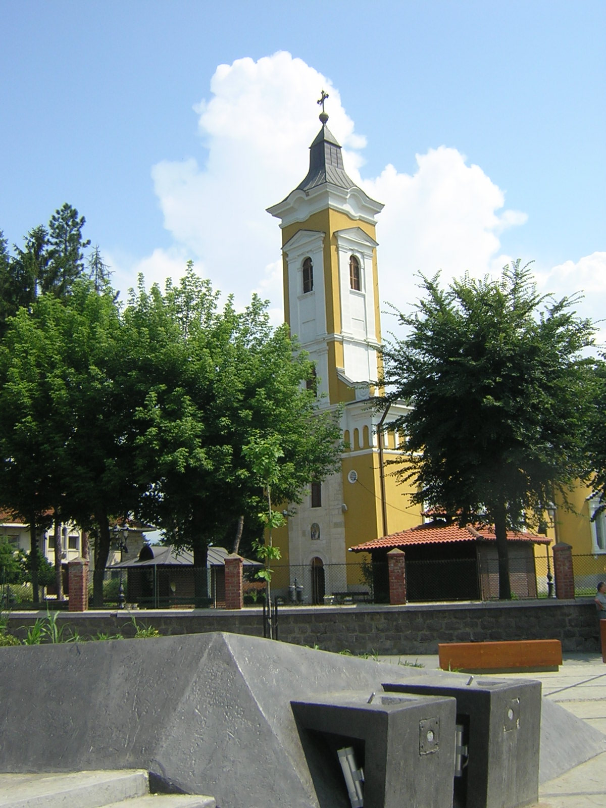 Pravoslavna crkva - stari deo Kraljeva